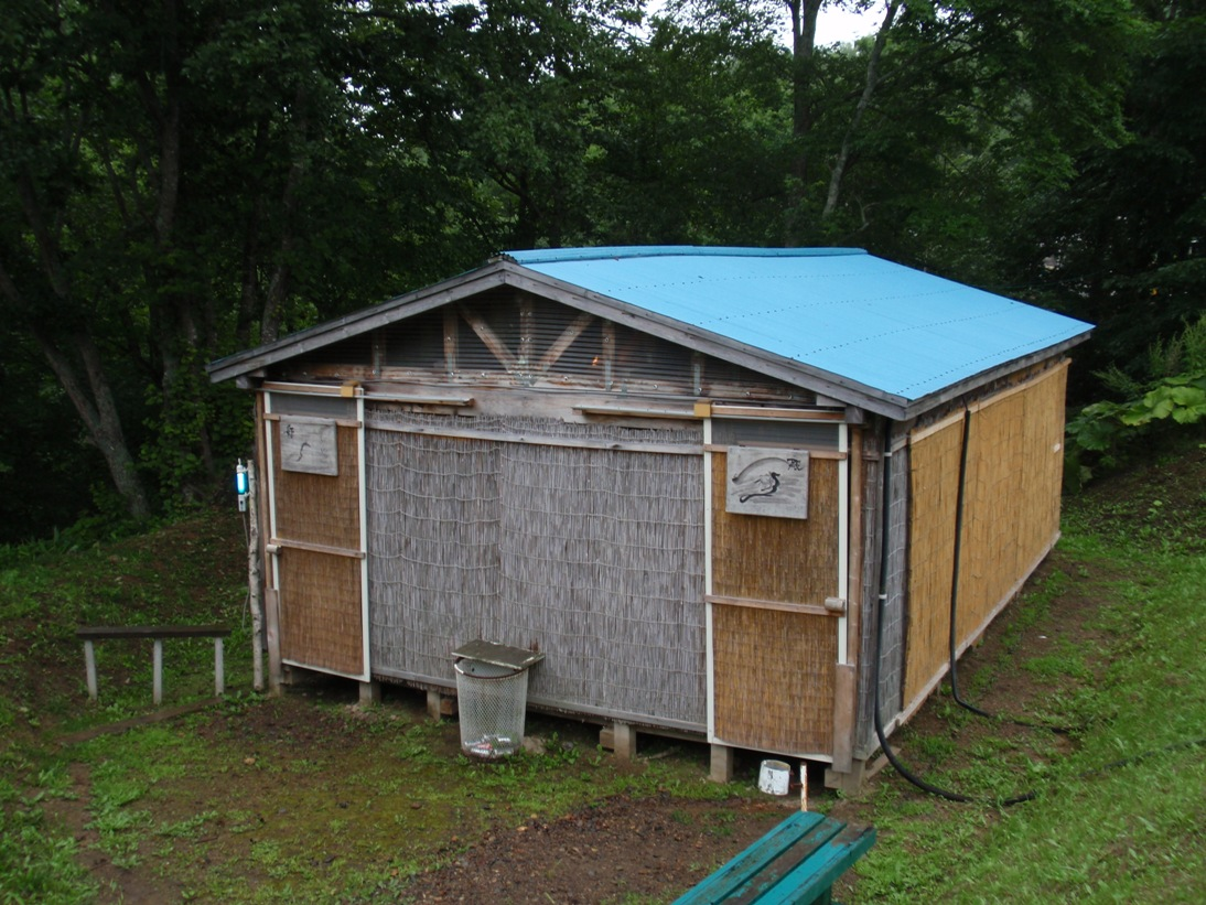 オーロラ温泉混浴棟の外観